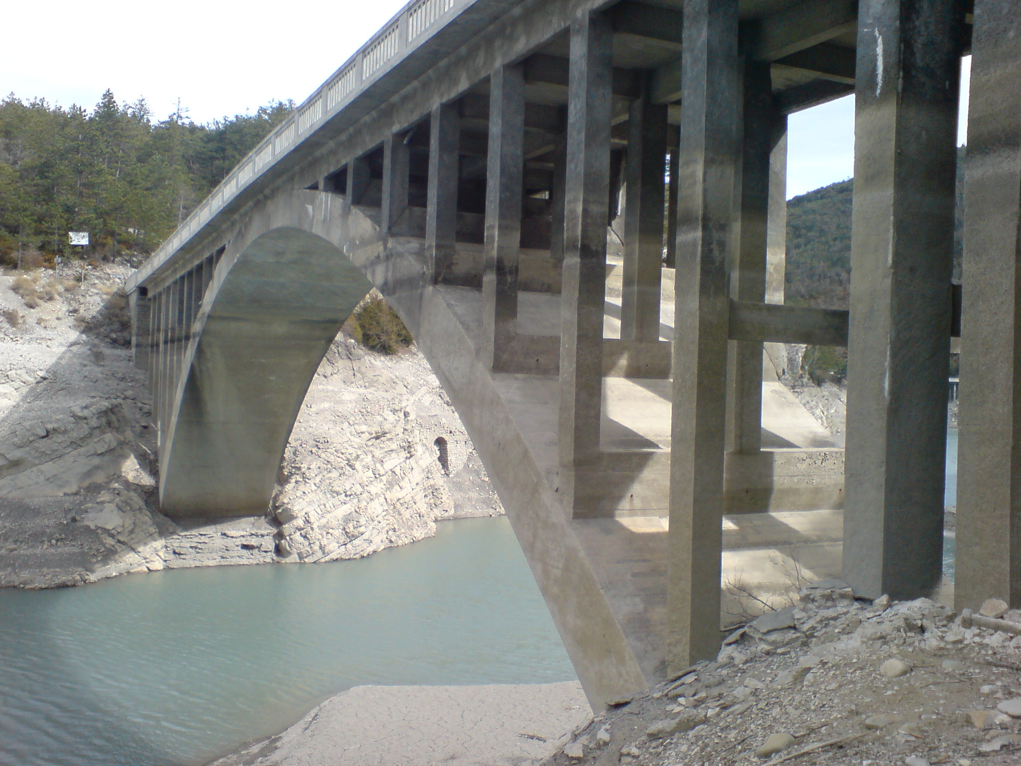 Information Pont en béton dit Julien, commune de Saint-André-les-Alpes, sur le Verdon (rivière) Alpes-de-Haute-Provence) Date : voir métadonnées